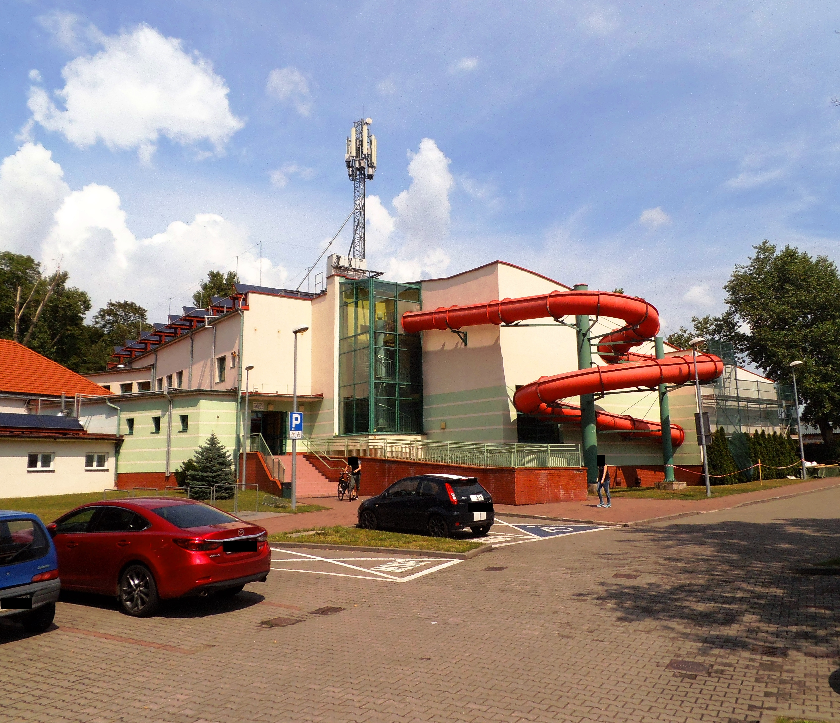 Mini Aqua-Park w Toruniu